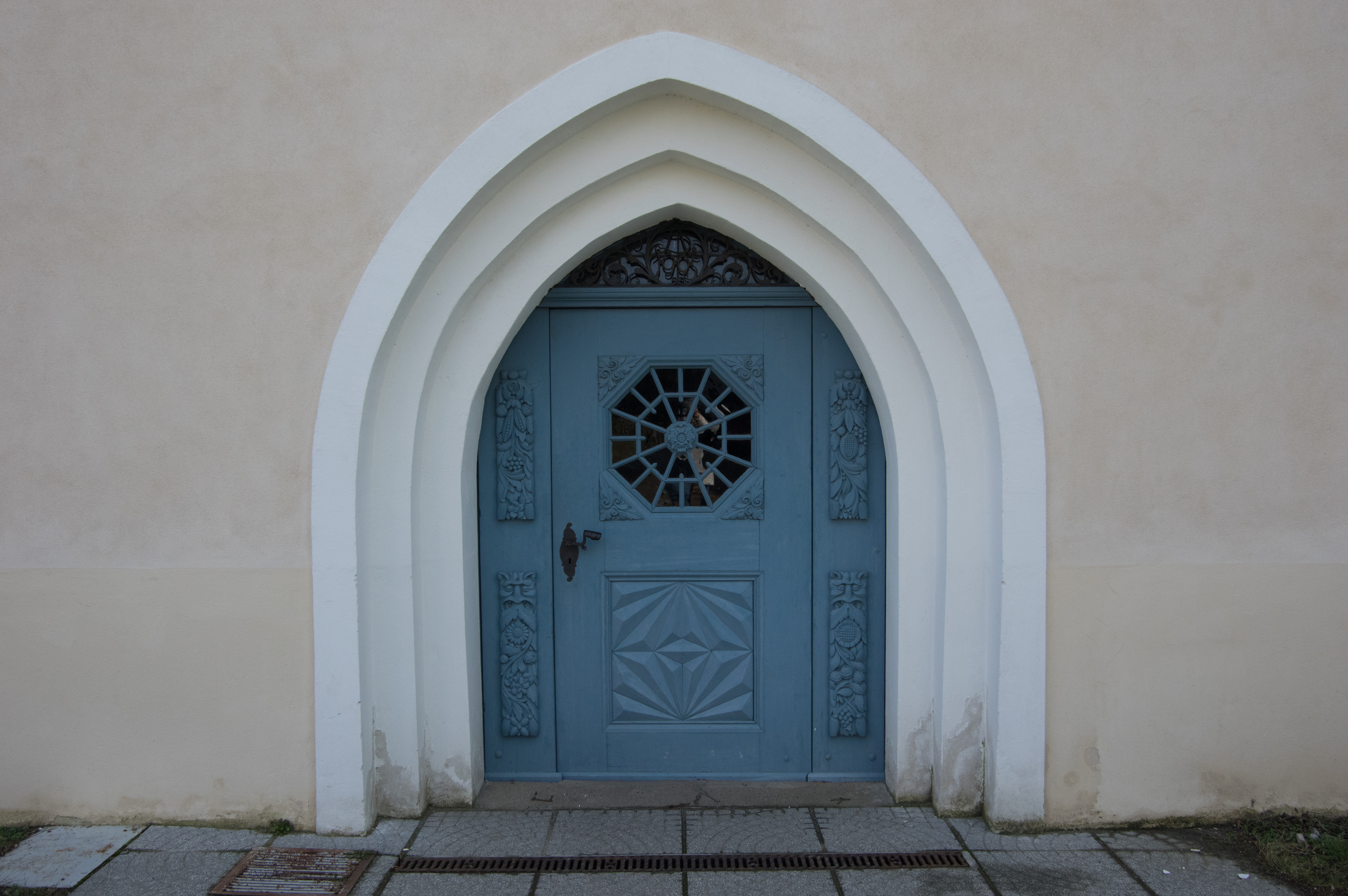 Dahme/Mark in Brandenburg. Die Kirche wurde 1670 nach einem Brand wieder aufgebaut. Sie steht unter Denkmalschutz.